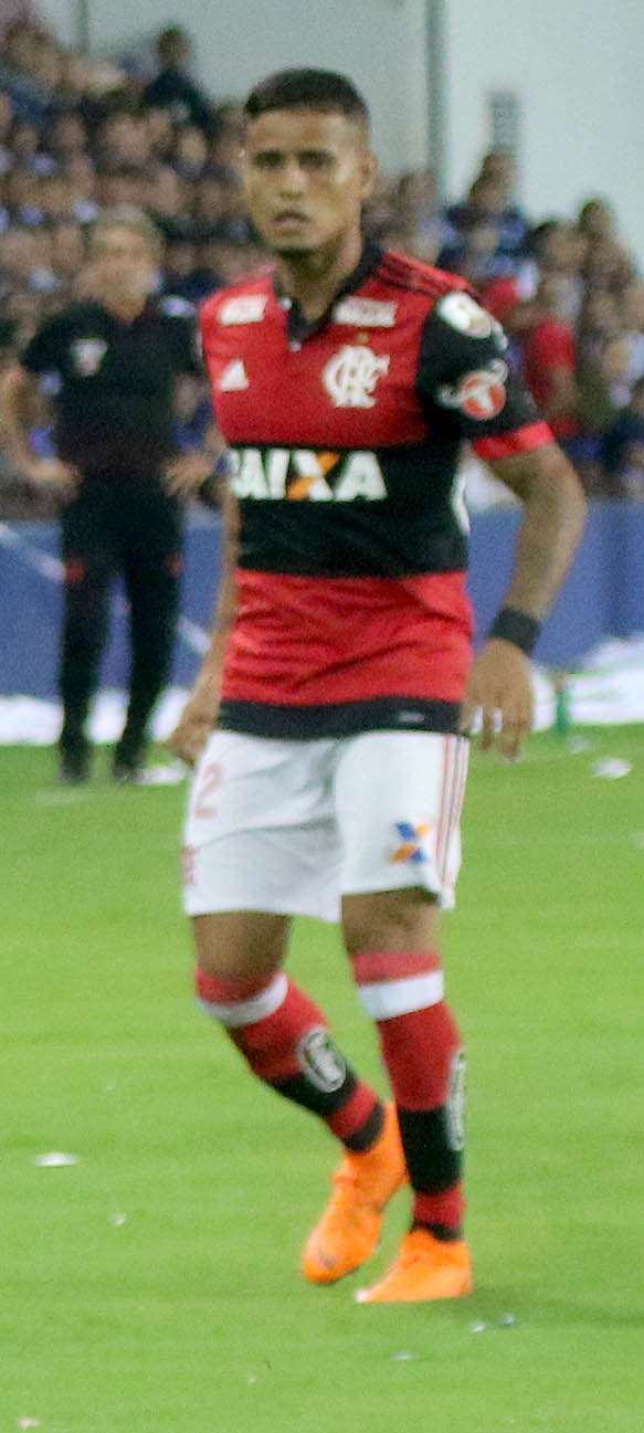 Guayaquil, miércoles 14 de marzo del 2018 (Andes).-En el estadio Capwell, Emelec enfrenta a Flamengo de Brasil, en partido por la segunda fecha del grupo D de la Copa Libertadores. Foto:César Muñoz/Andes